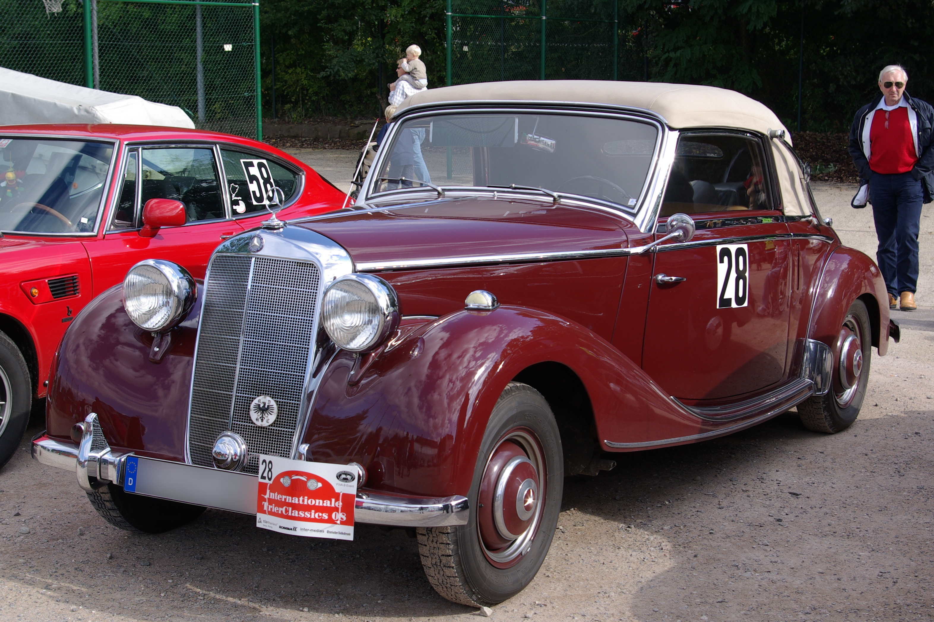 Mercedes Benz 170S W 136 Cabrio Baujahr 1951